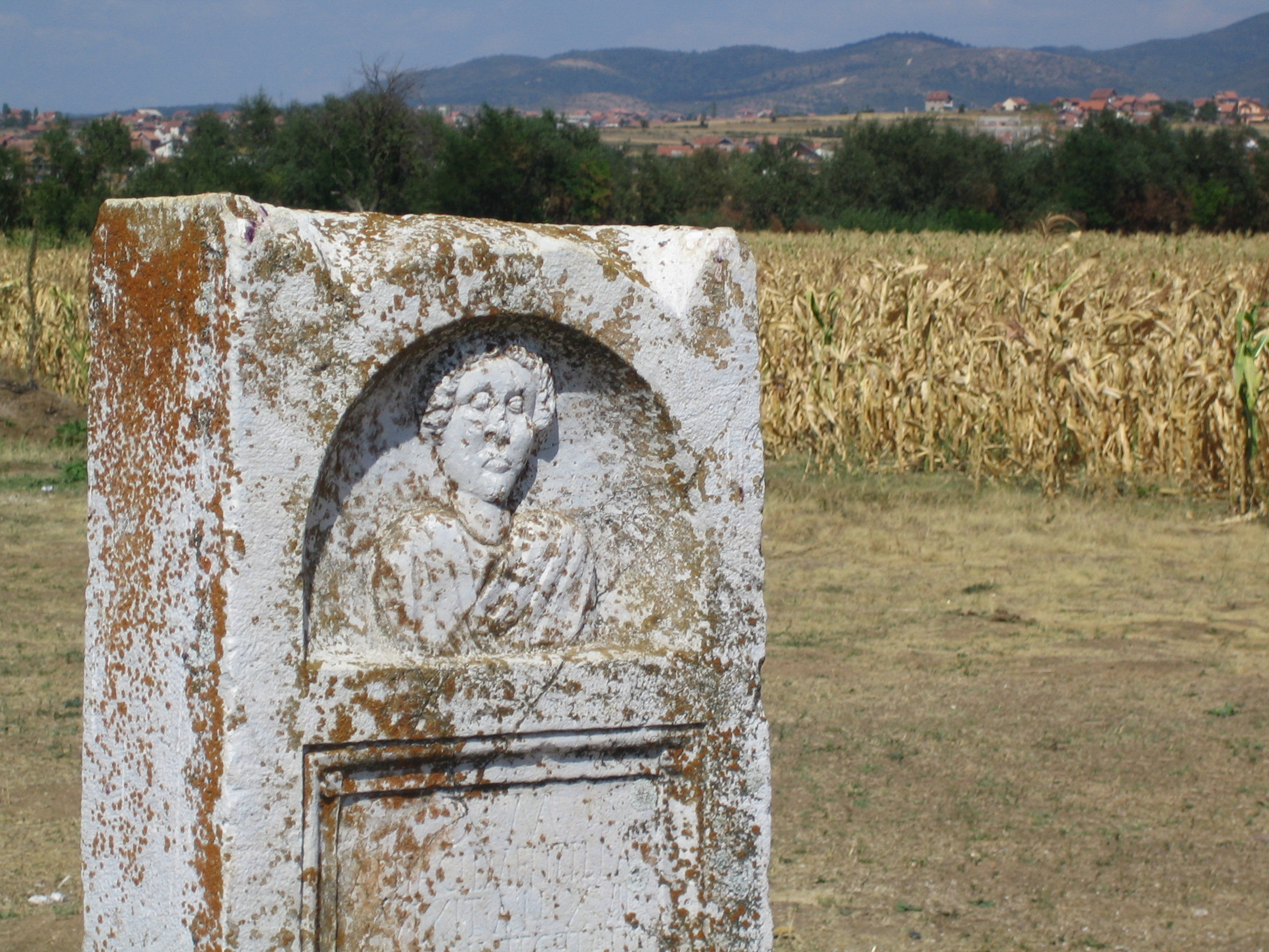 Überreste römischer Kultur in Ulpiana